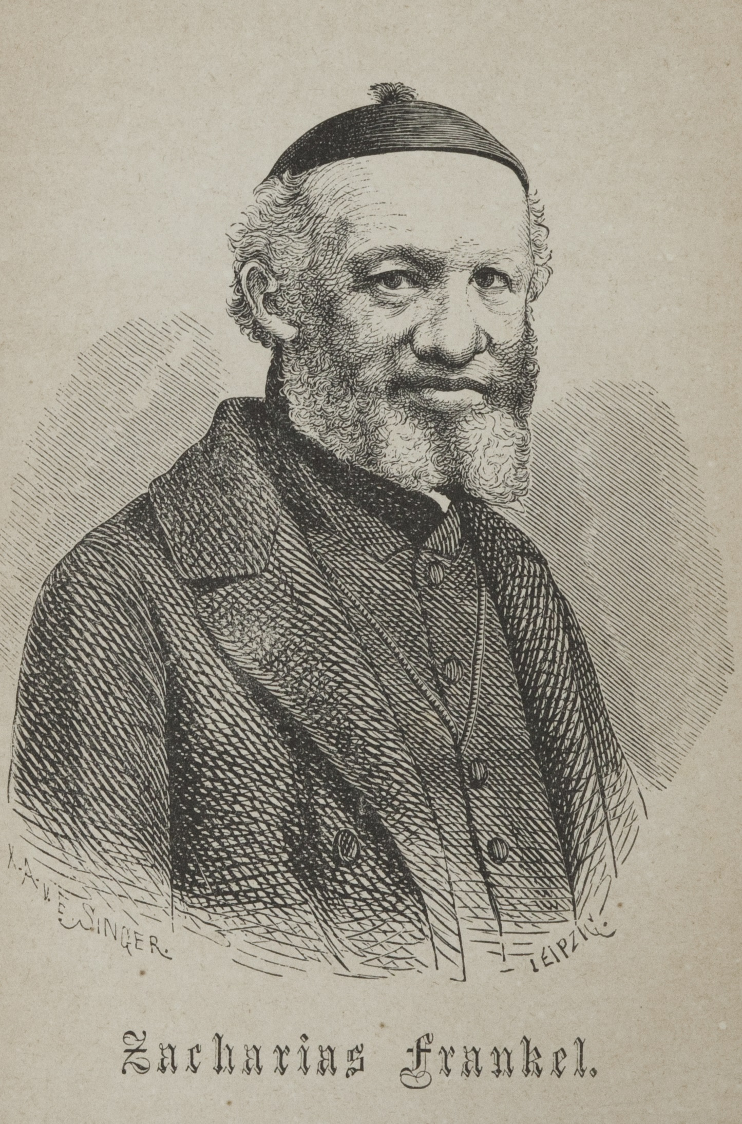 Zeichnung von Z. Frankel, erschienen in "Illustrierter jüdischer Familienkalender" 1882